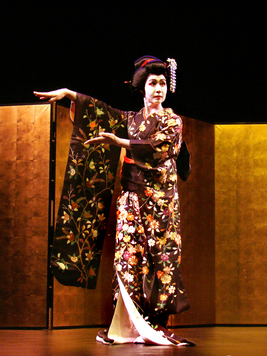 Eiko Hayashi Nihon Buyô – danse du Kabuki (Japon) accompagnée par Nobuko Matsumiya (koto) et Fumie Hihara (koto, shamisen) Auditorium du Musée Guimet samedi 22 novembre 2008